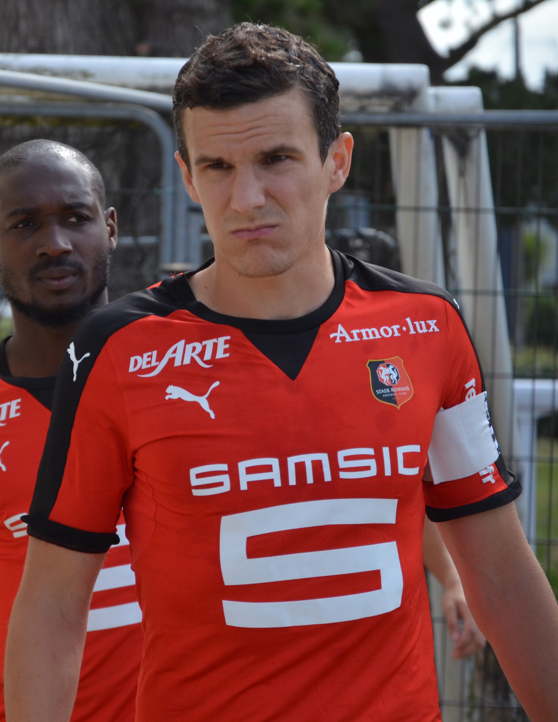 Photographie prise lors du match opposant le Stade rennais au Havre AC en amical au stade Paul-Audrin de Dinard le 8 juillet 2015. Ici, Romain Danzé.